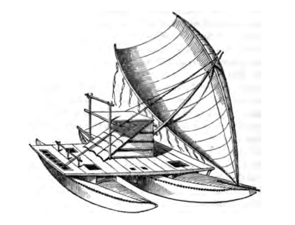 Fijian canoe